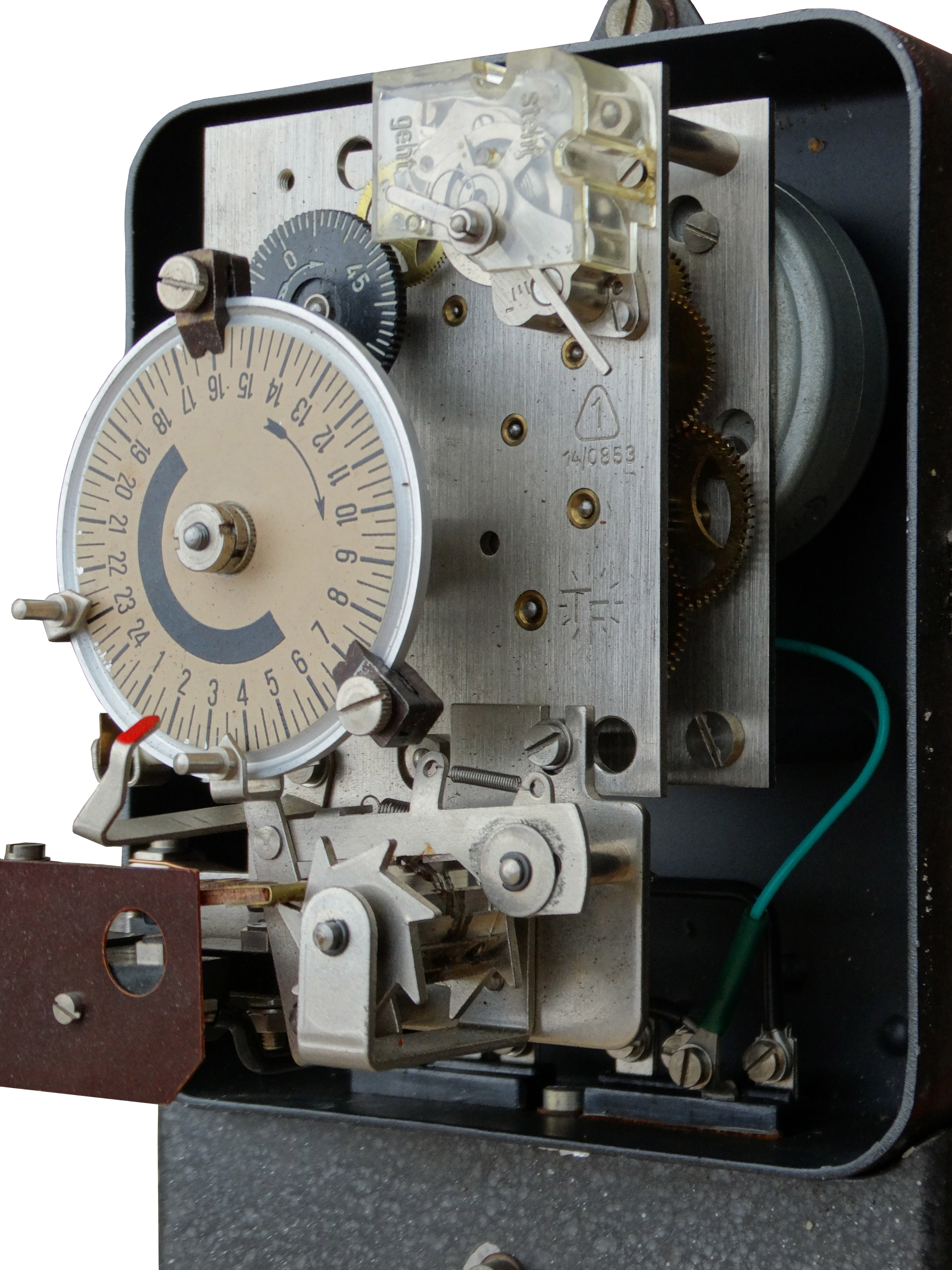 Der Aufbau einer Zeitschaltuhr, hergestellt von der Kurt Tittel KG Frauenstein1967